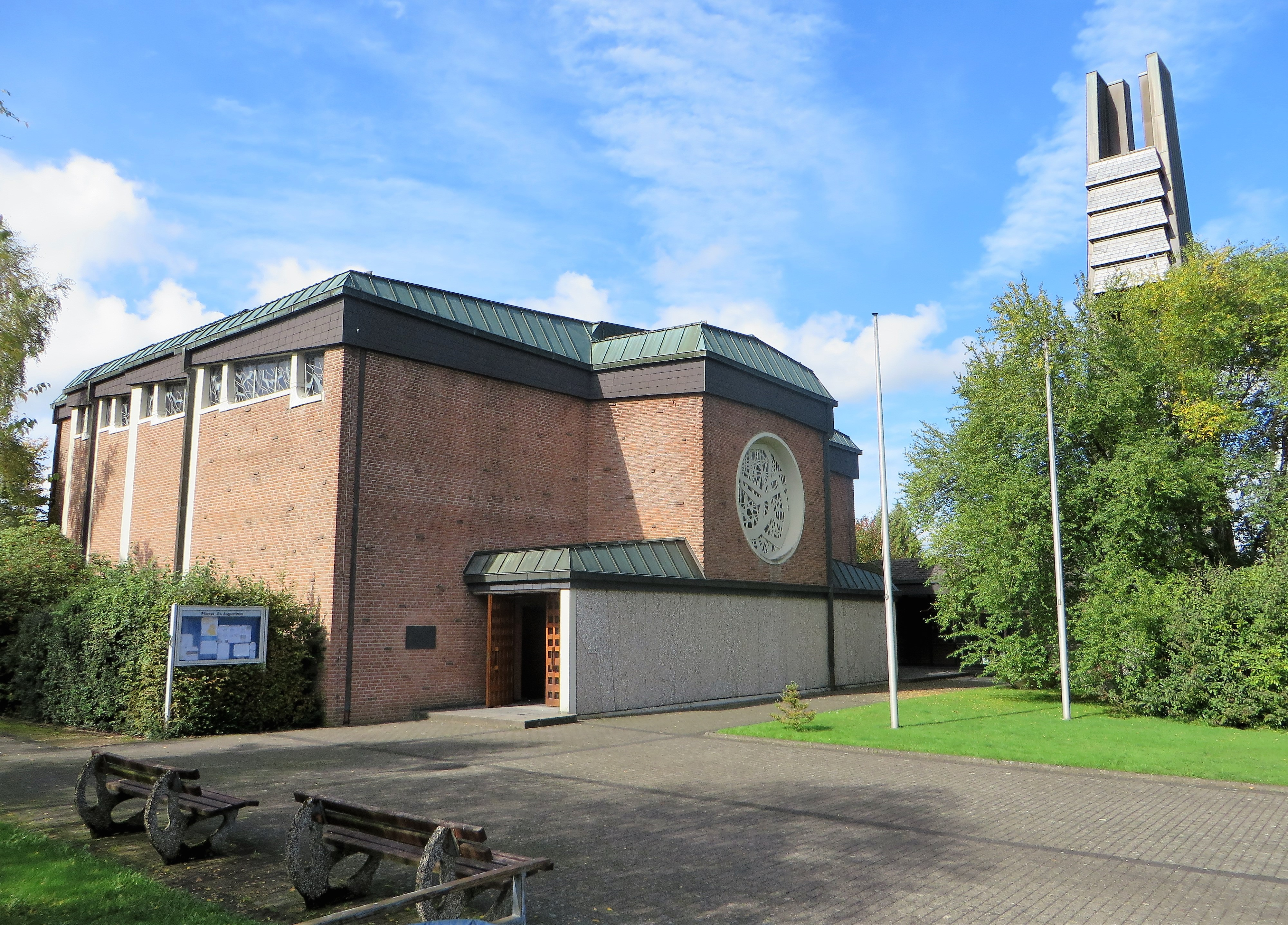 Katholische Pfarrkirche St. Augustinus im Attendorner Ortsteil Neu-Listernohl, Pfarrweg 1. Im Jahre 1963/65 erbaute Saalkirche in Backstein und Stahlbeton-Optik mit frei stehendem Glockenturm.